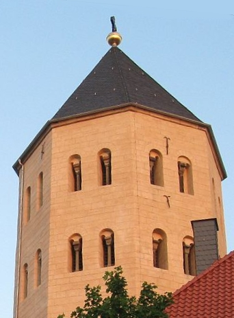 Beispiel einer Fugenritzung am Turm der Gaukirche in Paderborn